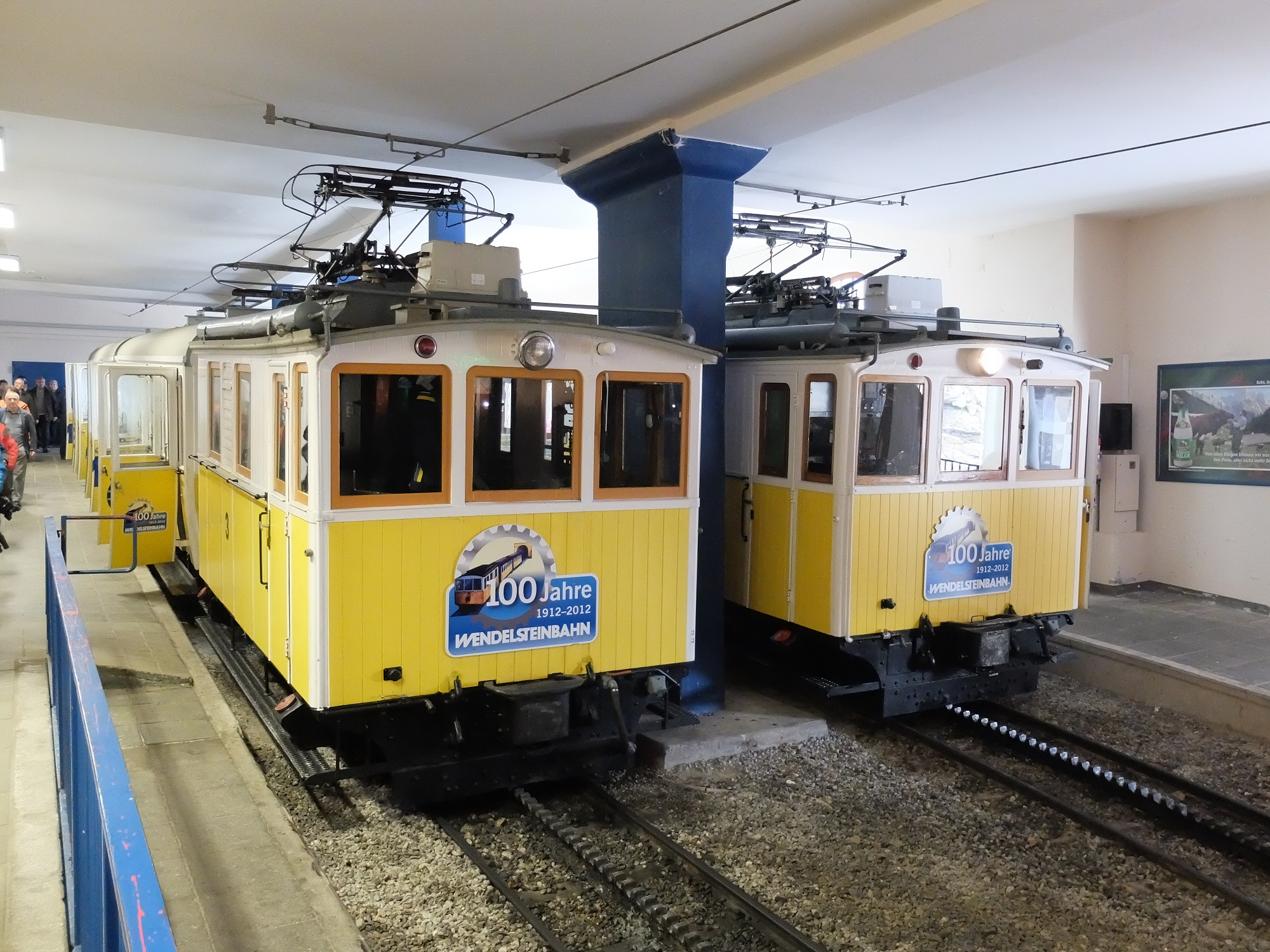 Lok 2 und 3 der Wendelsteinbahn mit Beiwagen in der Bergstation